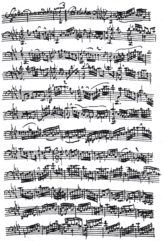 Afkomstig van de volgende site: Stamt van vóór 1750 en is daarmee meer dan 70 jaar oud dan de sterfdatum van de auteur (Anna Magdalena Bach). Valt dus onder publiek domein, afbeelding van kunst.